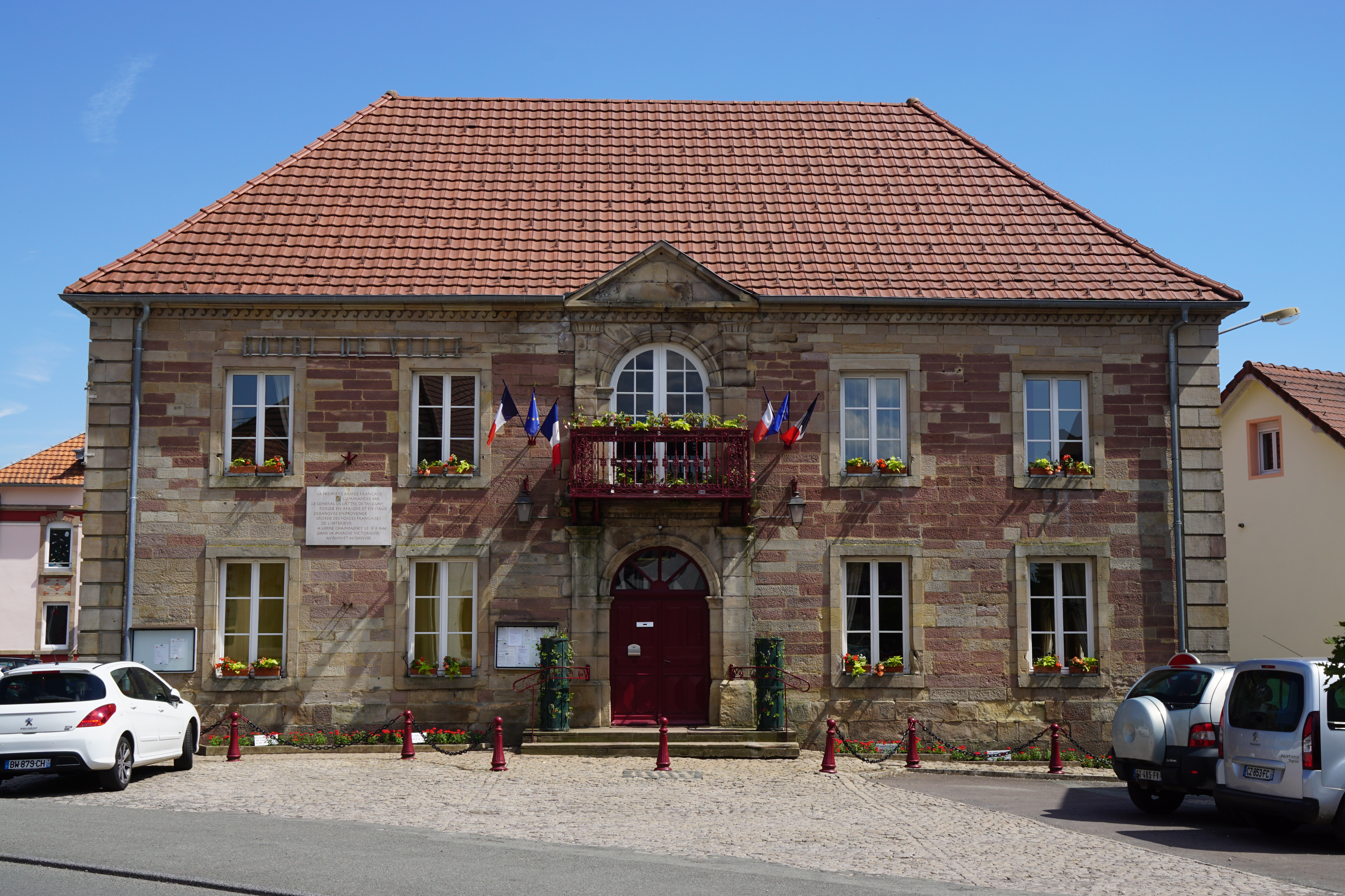 La mairie de Champagney (Haute-Saône).